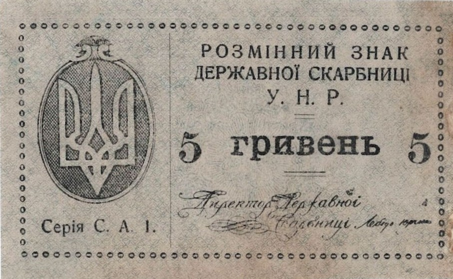 Аверс 2 гривні Директорії УНР